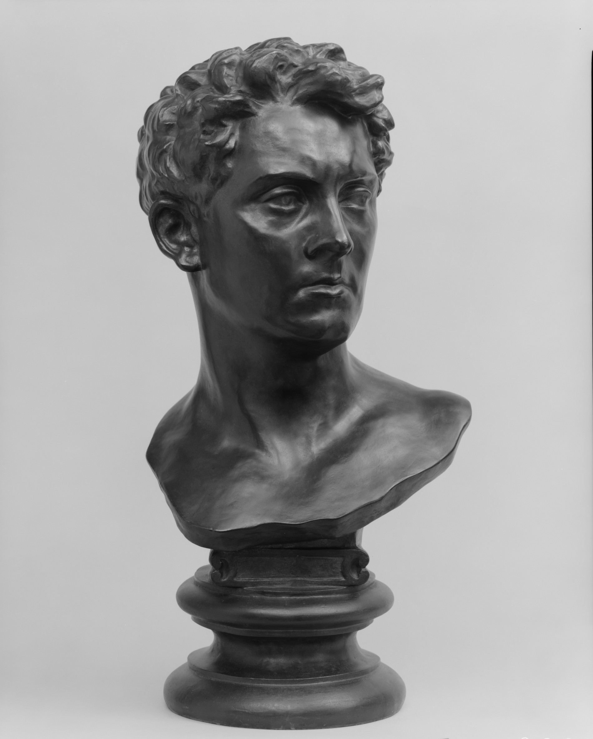 Bust; Sculpture